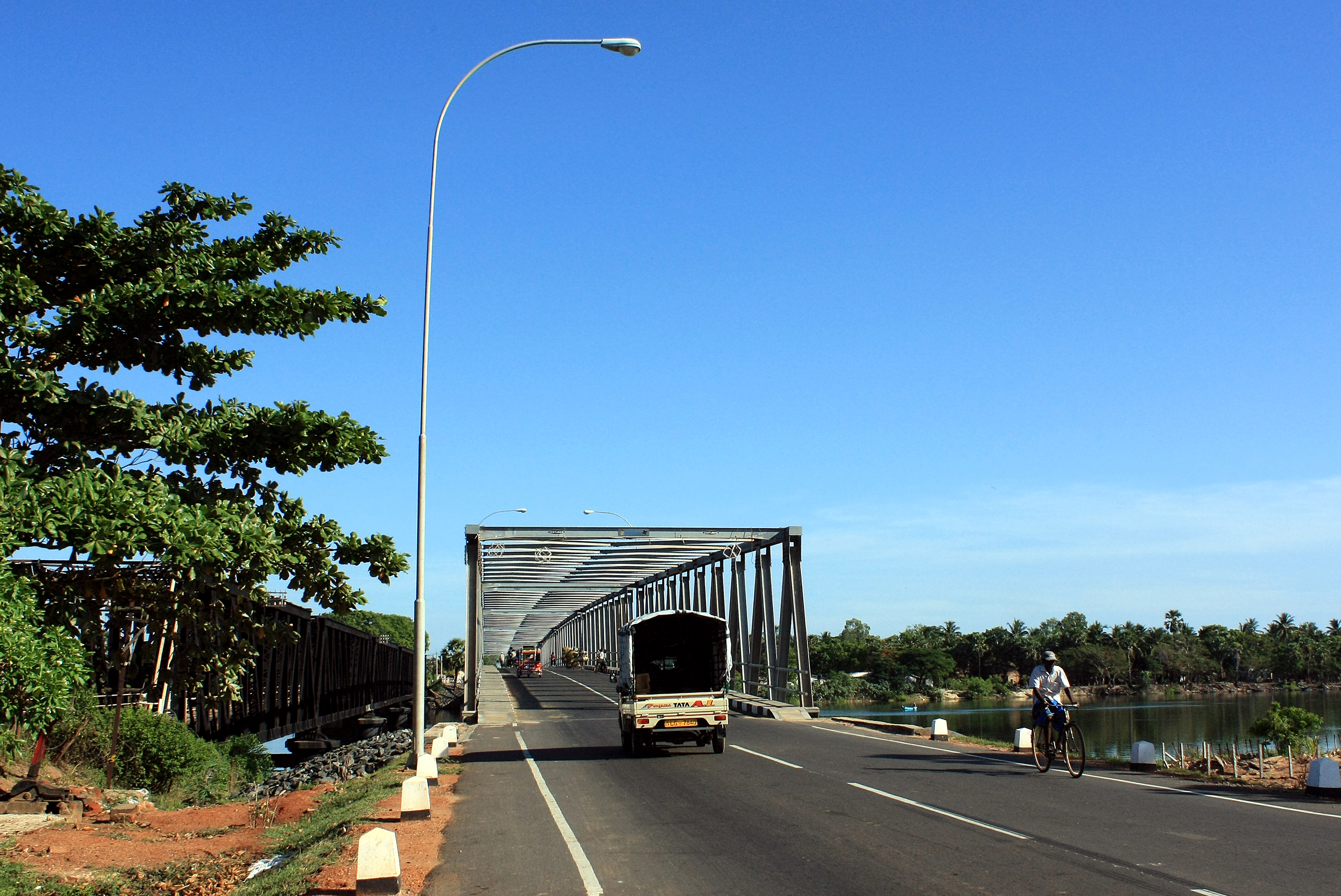 ஓட்டமாவடி பாலம் - பிரதான தரைவழியை பிரிக்கும் மட்டக்களப்பு வாவியை கடக்க உதவும் பாலம்